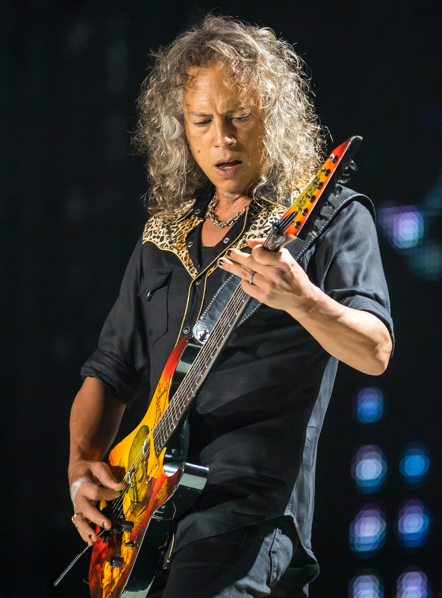 Kirk Hammett with Metallica performing in San Antonio, Texas (2017-06-14)